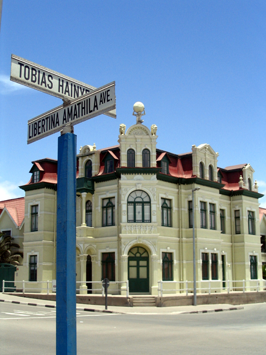 Hoehenzollernhaus mit Strassenschild (Swakopmund)